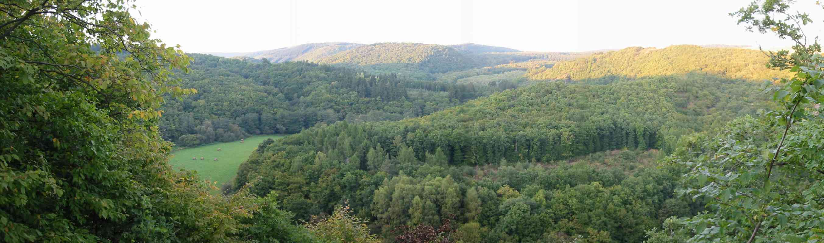 Hahnenbachtal bei Schneppenbach, selbst fotografiert, gemeinfrei